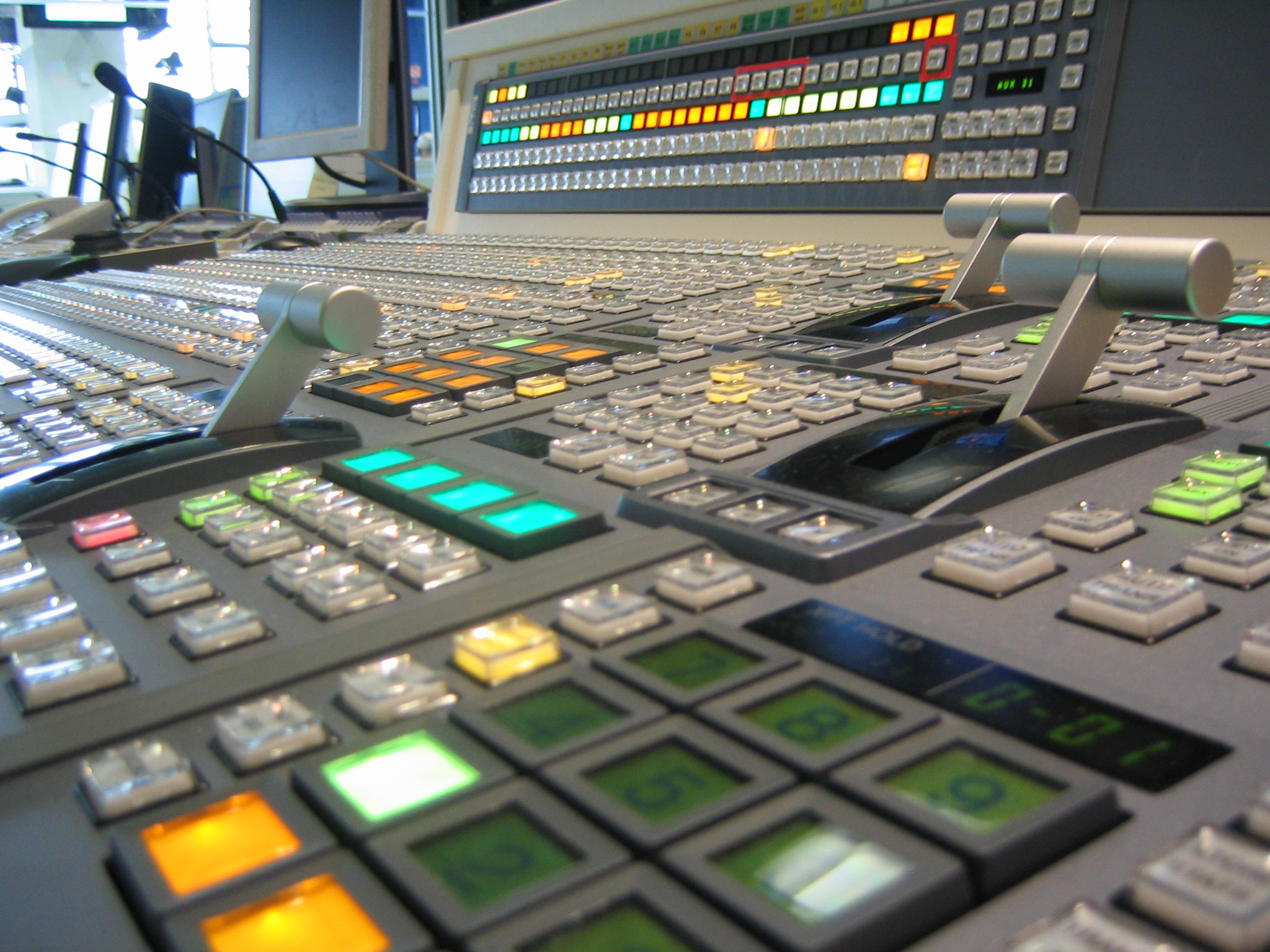 Consola de una mesa de vídeo de 4 bancos, detalle del panel. Marca Sony.